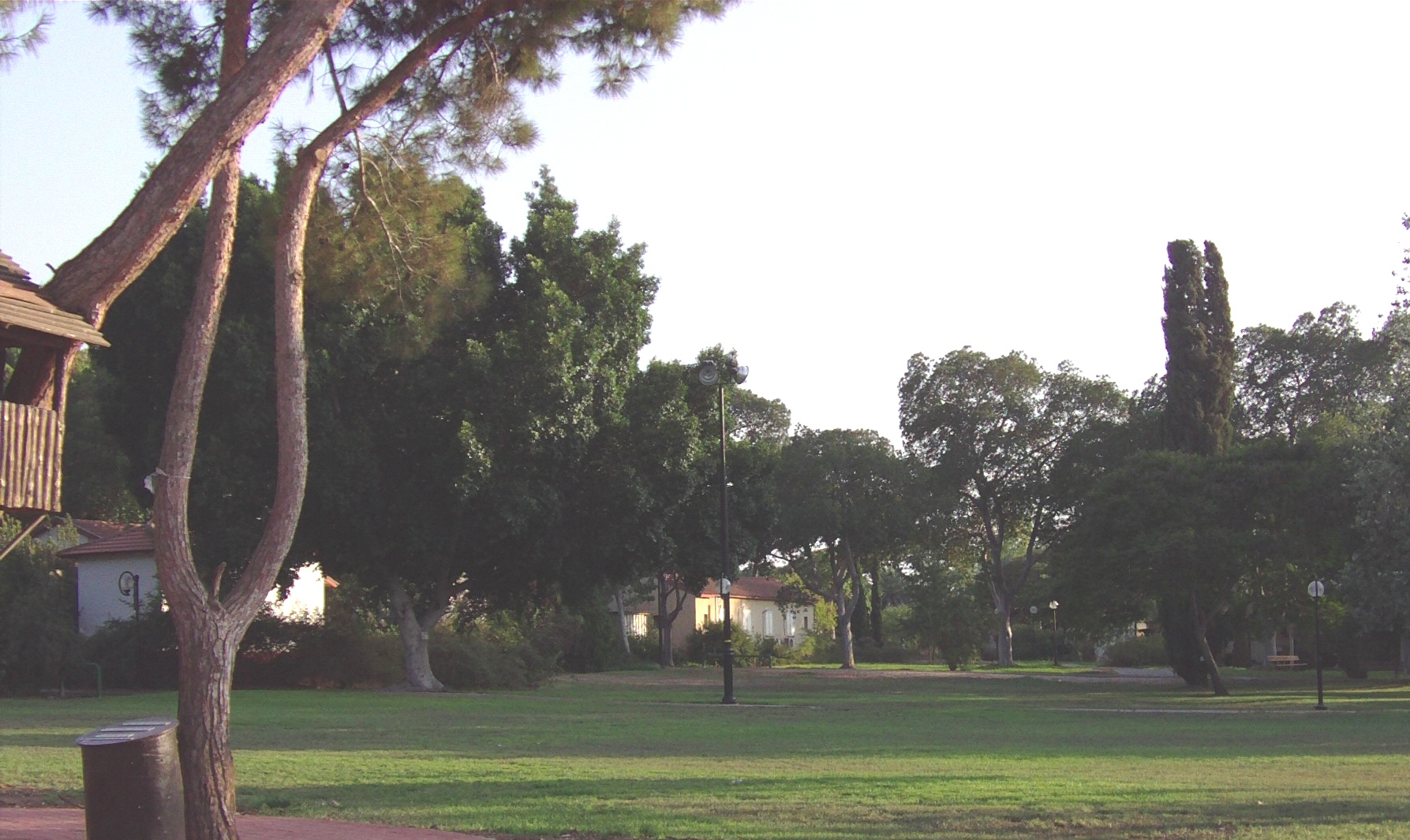 Kibutz Beerot Ytzhak צילום בקיבוץ